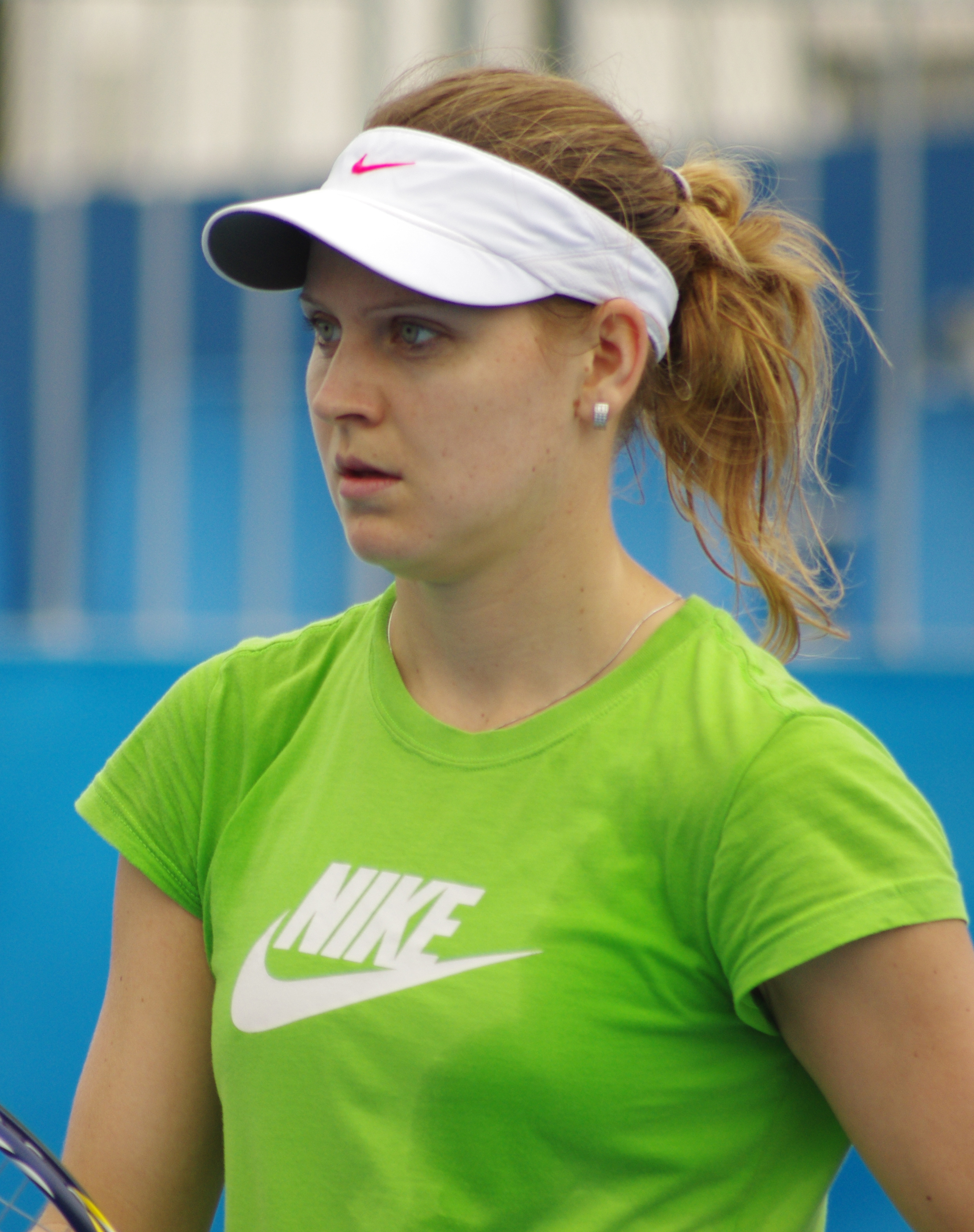 Lucie safarova